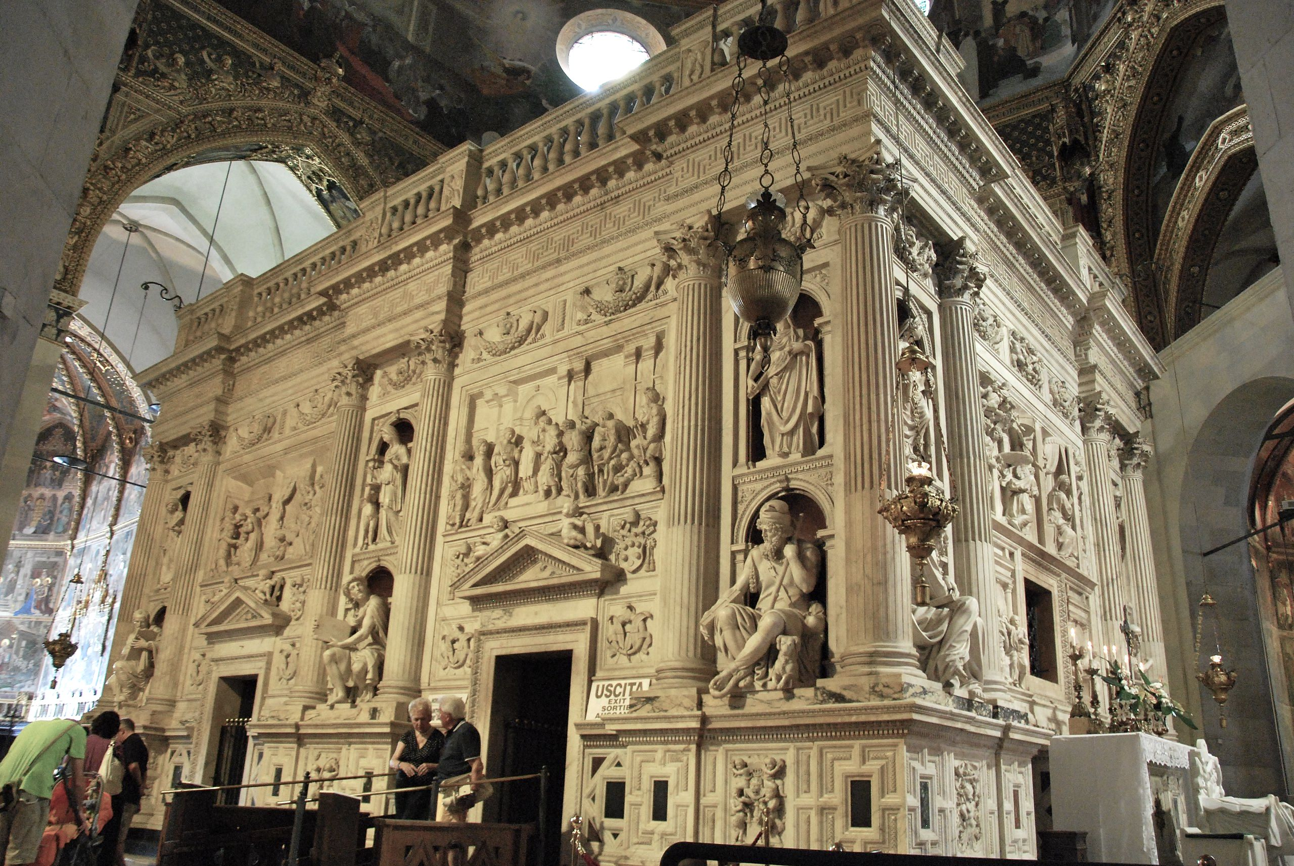 re-étalonnage de la photo préexistante sur wiki commons